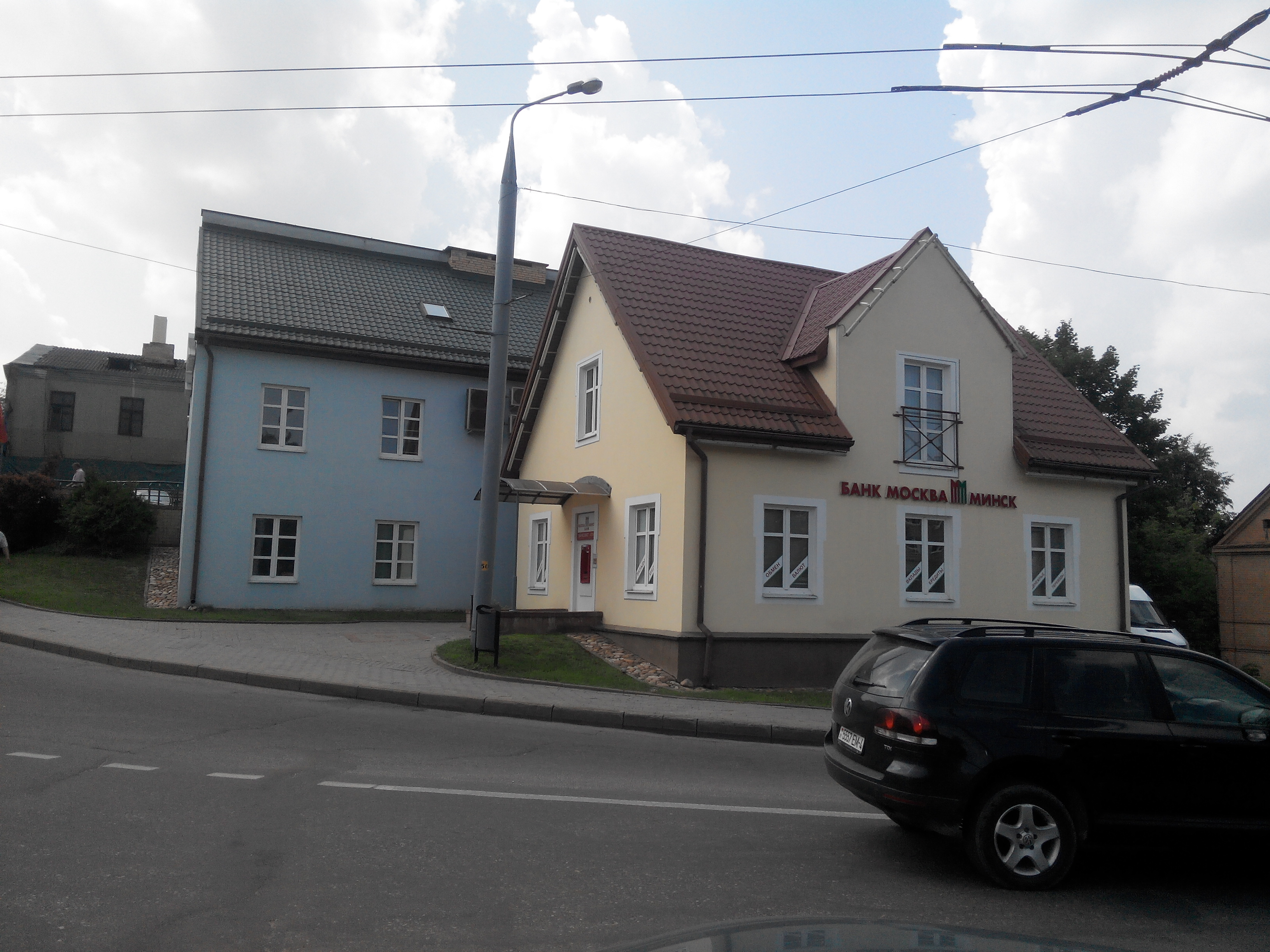 Будынак па вул. Вялікая Траецкая, Гродна